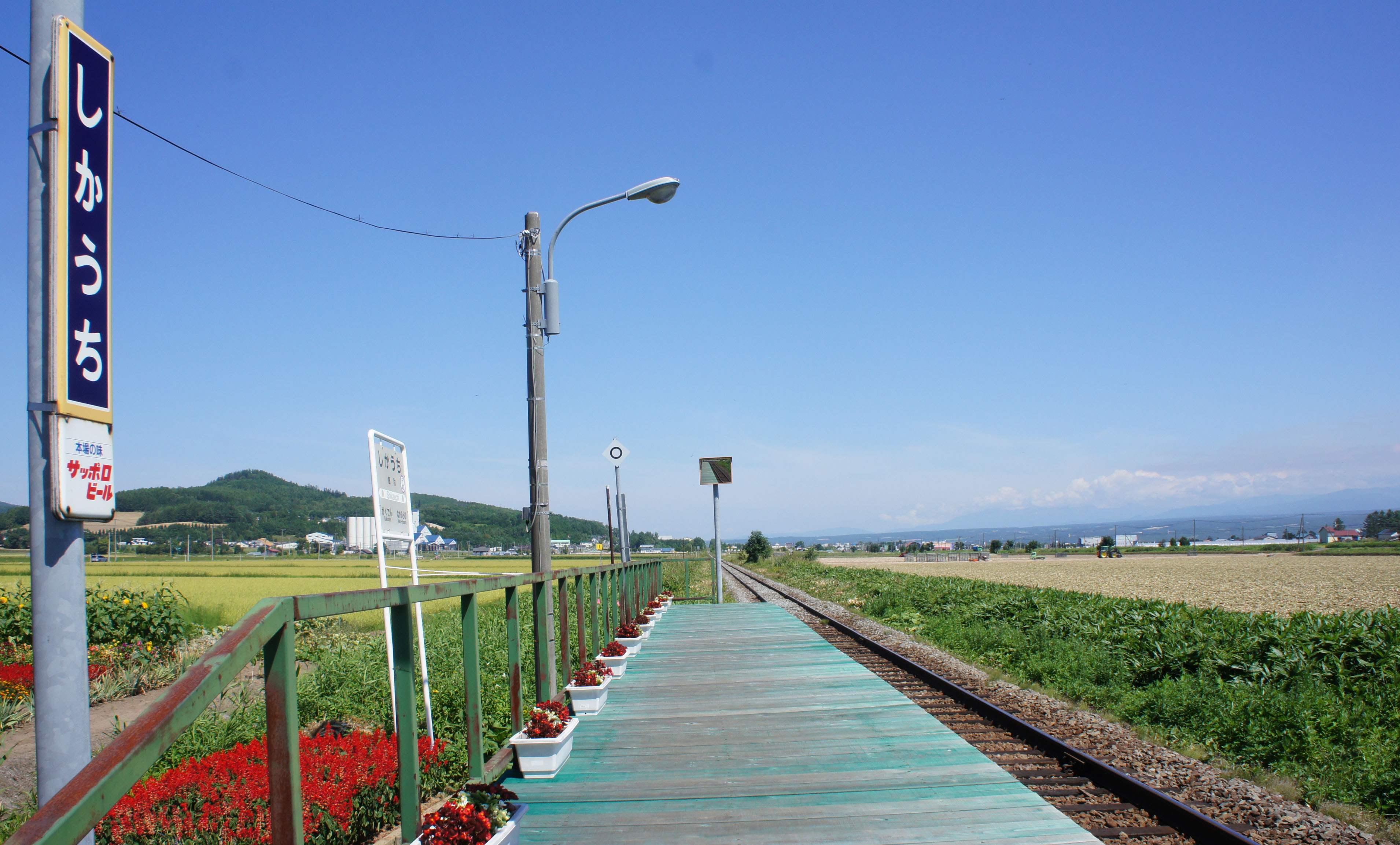 JR富良野線・鹿討駅のホーム